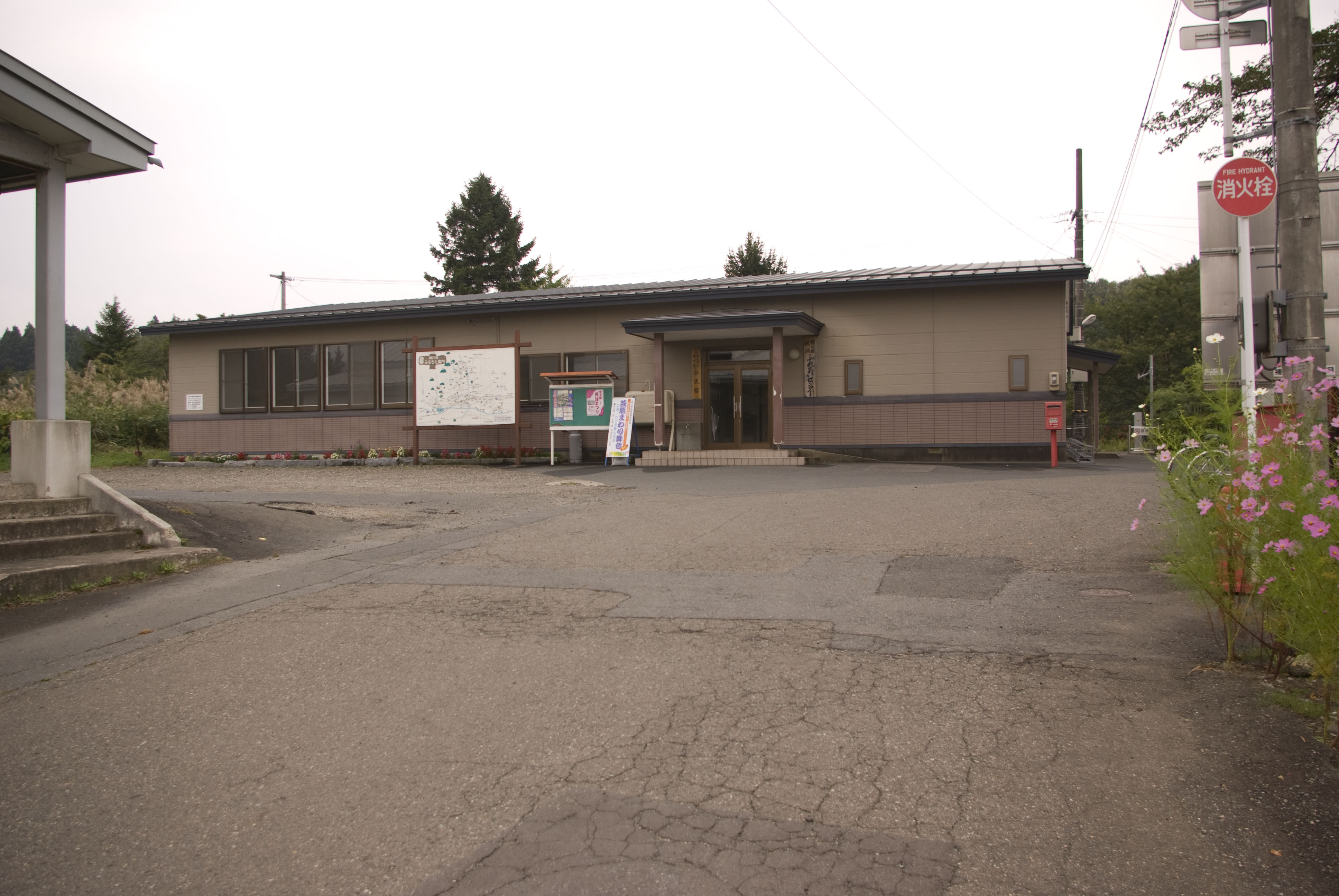 東日本旅客鉄道株式会社北上線横川目駅